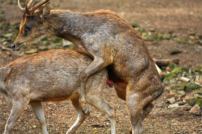 Making Love